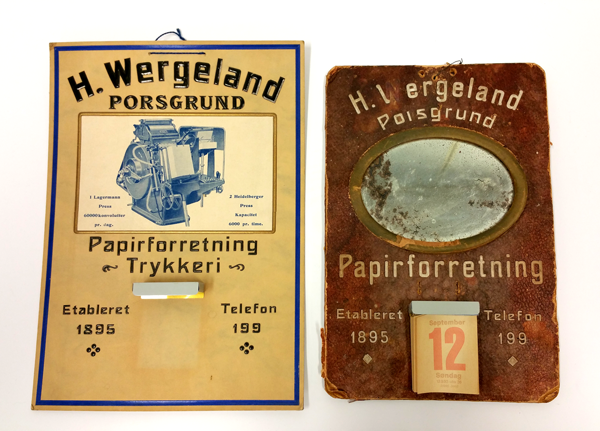 Gamle kalendere fra Wergeland trykkeri og papirforretning.